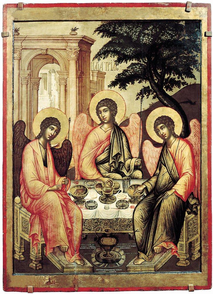 Троица Ветхозаветная Греческая надпись на иконе сообщает дату исполнения и имя художника, а так же имя "надзирателя и соучастника" (заказчика?) - греческого купца Николая Николеты, происходившего из города Янины в Македонии, но переселившегося в Москву. Икона попалав Гатчинский дворец-музей, откуда в 1925 передана в ГРМ. Архитектурный фон иконы скопирован, как установлено, с гравюры, воспроизводящей картину Паоло Веронезе "Пир у Симона Фарисея". "«Ветхозаветная Троица» Симона Ушакова (1671 г., Государственный Русский музей) – один из лучших образов, созданных иконописцем. В целом она следует композиционно-иконографическому решению «Троицы» Андрея Рублева. Обе иконы – монументальные, лишь незначительно отличающиеся друг от друга по размеру. Оба художника изображают трех Ангелов за трапезой, без предстояния Авраама и Сары, служивших Им. Ангел, сидящий по центру, не имеет крестчатого нимба, то есть Второе лицо Святой Троицы не выделяется. Рисунок складок одежд Ангелов на иконах совпадает.